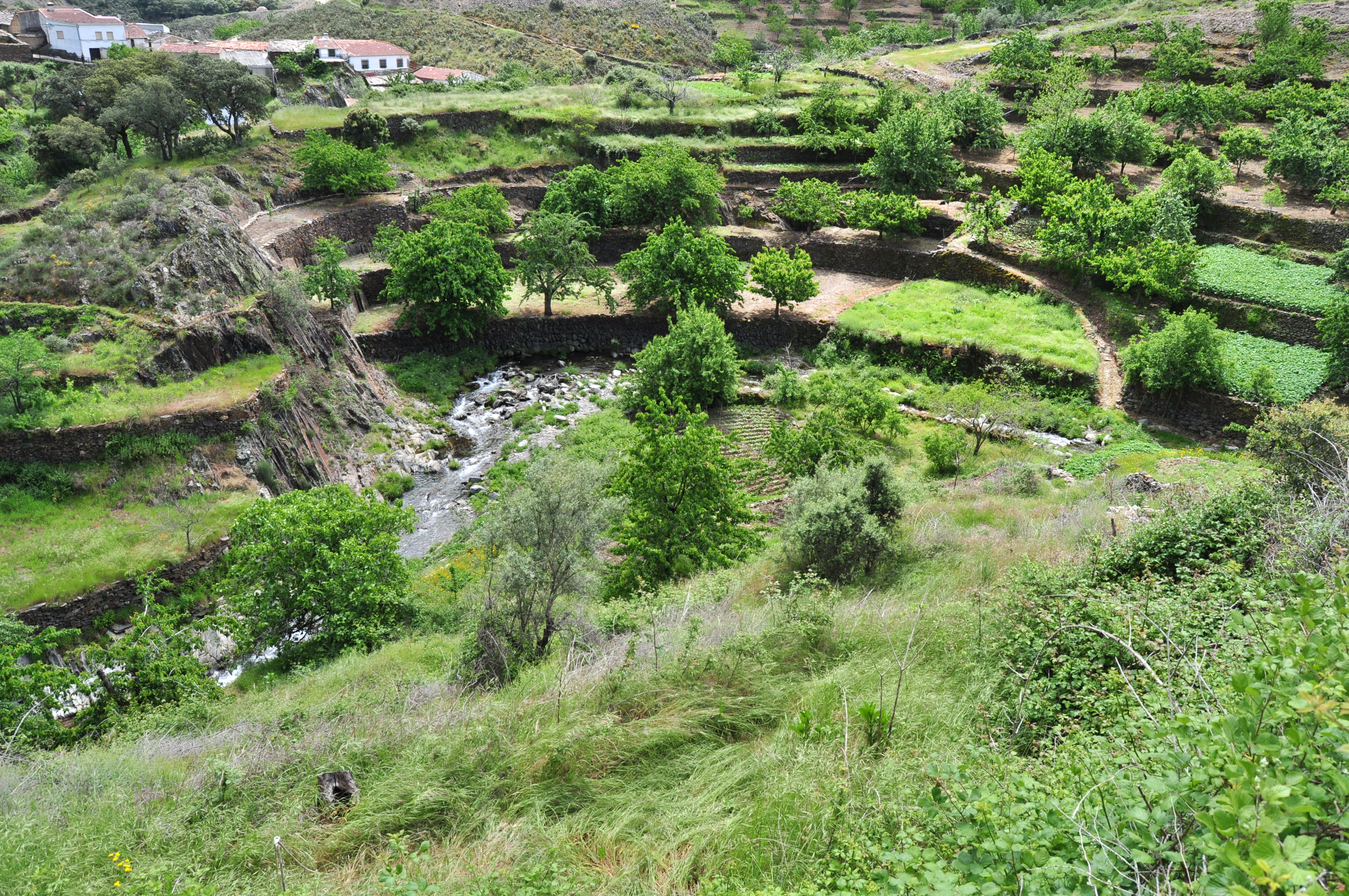 Casa Rubia (Casares de las Hurdes) - 002